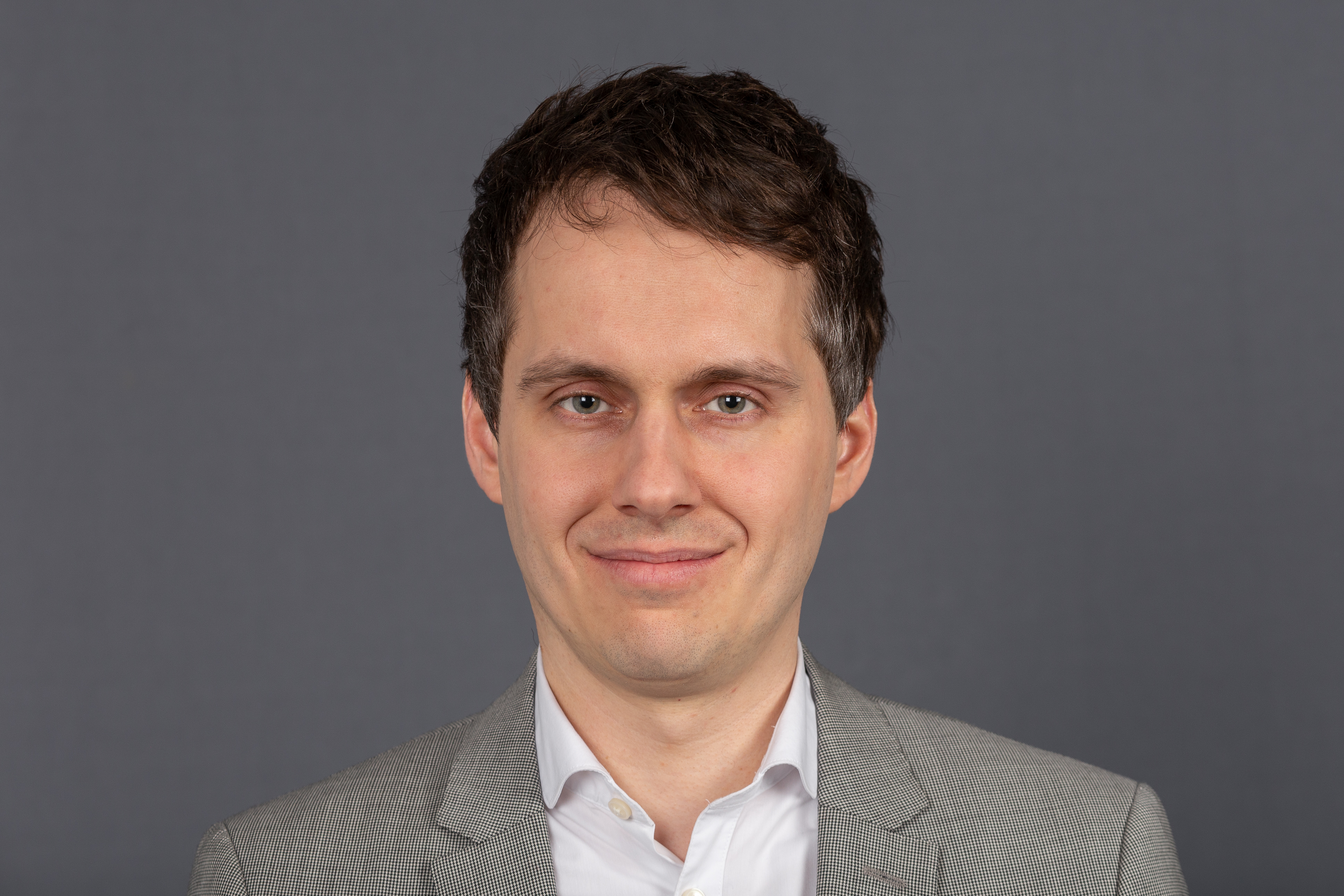 Deutscher Bundestag; Sven-Christian Kindler, B90/Die Grünen